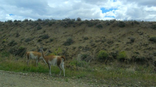 Coirón